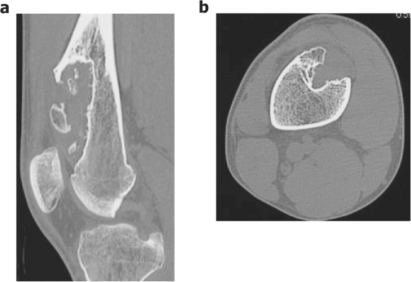 TC di un cordoma localizzato a livello della superficie anteriore del femore. Notare le calcificazioni nel suo contesto. Tratto da: Imura et al. 2014 A giant periosteal chondroma of the distal femur successfully reconstructed with synthetic bone grafts and a bioresorbable plate: a case report World Journal of Surgical Oncology. CC-BY 4.0 Licence